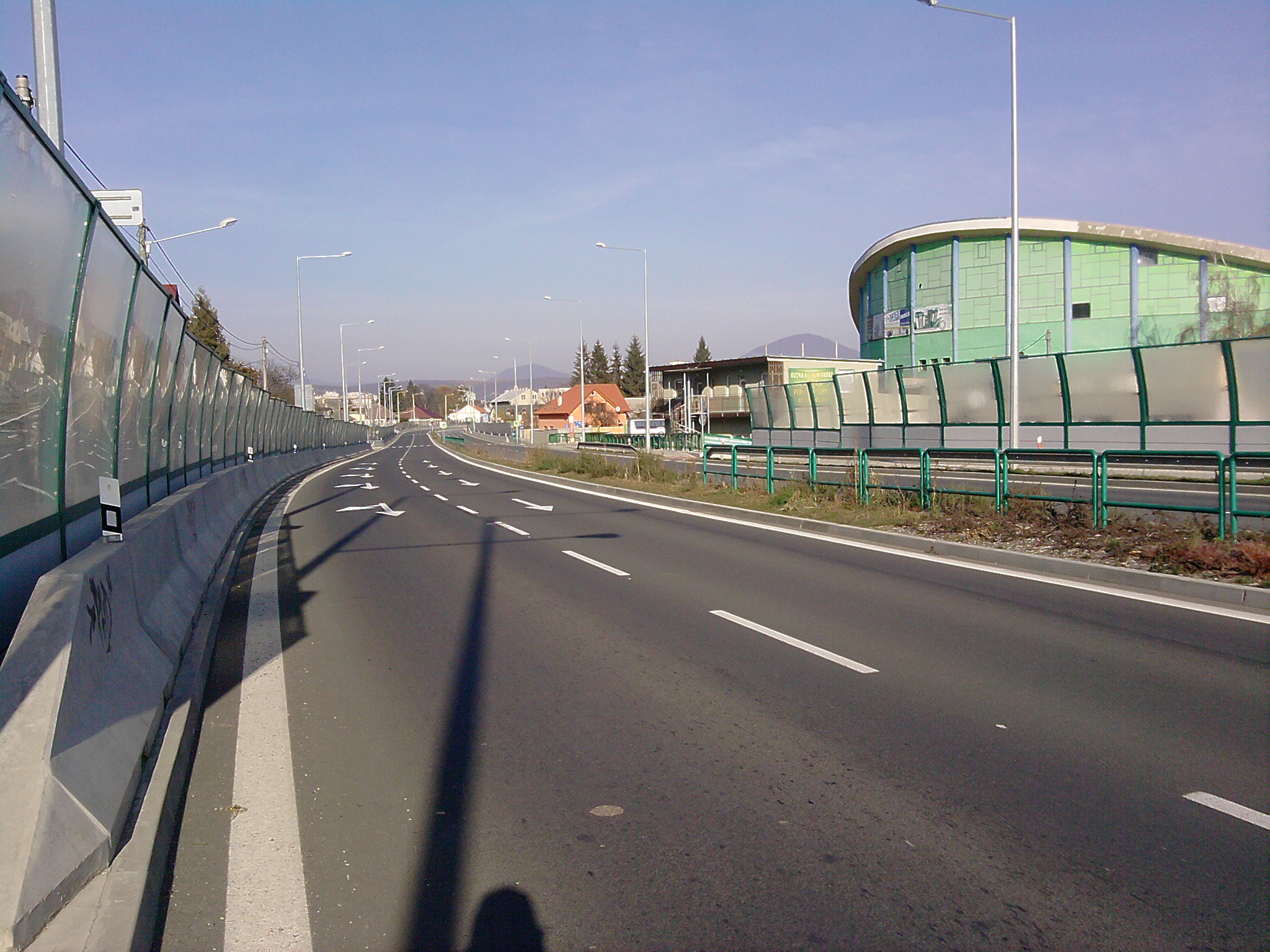 Nábrežná komunikácia, Pod Kalváriou, Prešov